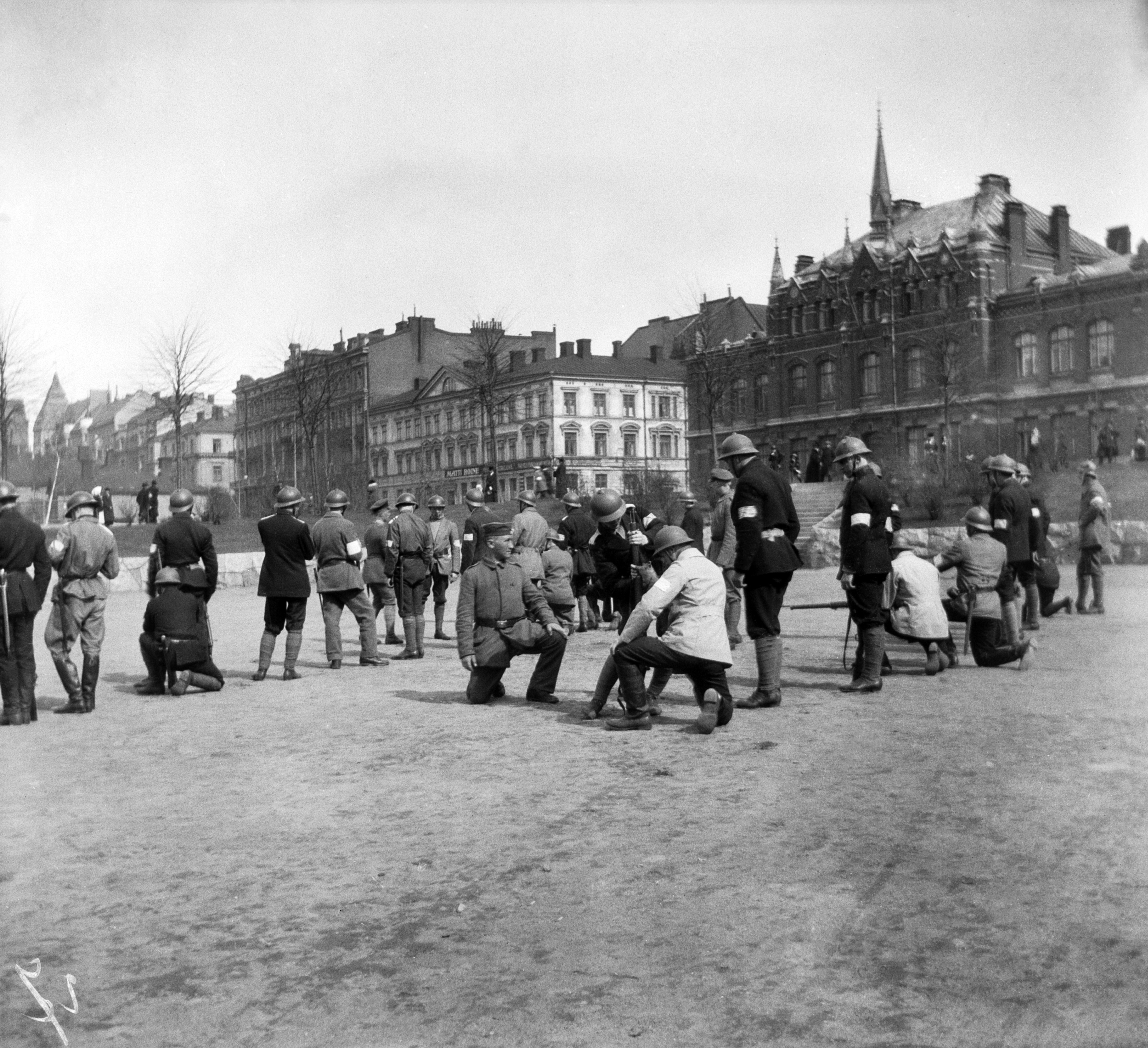 Helsingin valtaus 1918. Saksalaiset upseerit opettavat valkokaartilaisia Johanneksen kentällä. -- negatiivi, nitraatti, mv